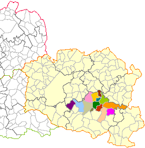 Communes du canton d'Avesnes-sur-Helpe-Nord